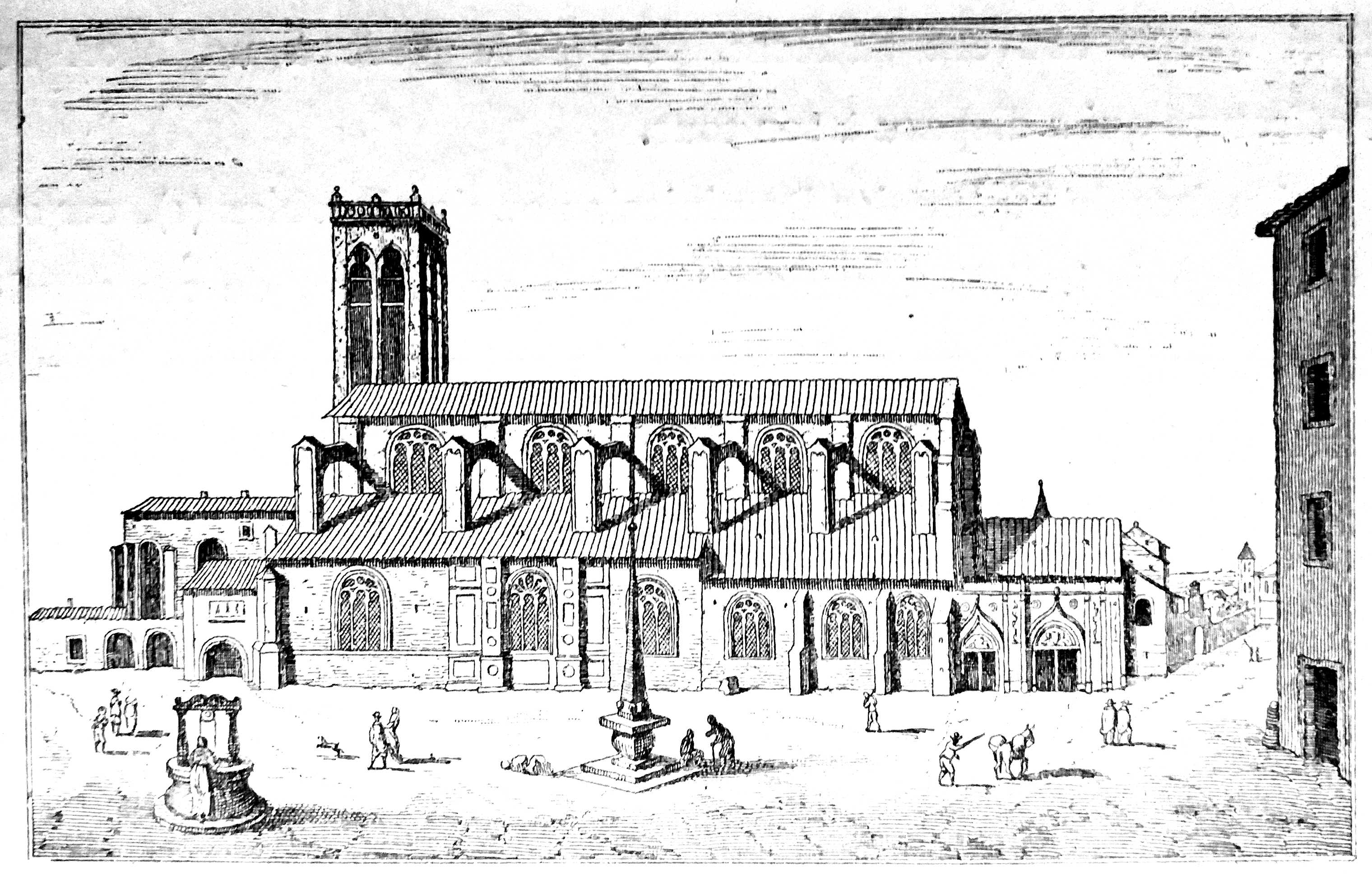 Église des Jacobins de Lyon détruite au début du 19e siècle. Gravure d'après Israël Silvestre du 17e siècle. Musées Gadagne, inventaire N 780 bis 25.